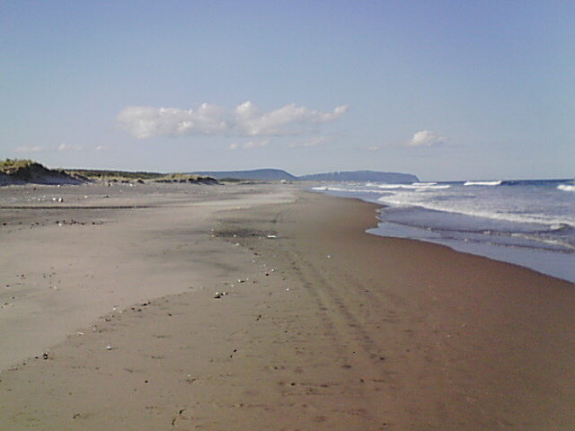 Sarugamori Sand Dunes, Higashidori, Aomori, Japan 猿ヶ森砂丘